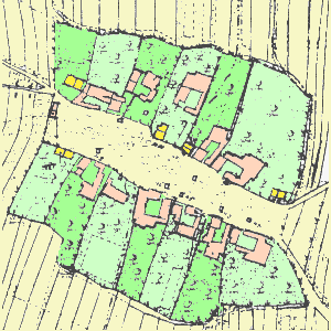 Urflurkarte des Dorfes Grünbach, Gemarkung Abtschlag, Gemeinde Kirchdorf im Wald überarbeitet und koloriert von Christian Benz